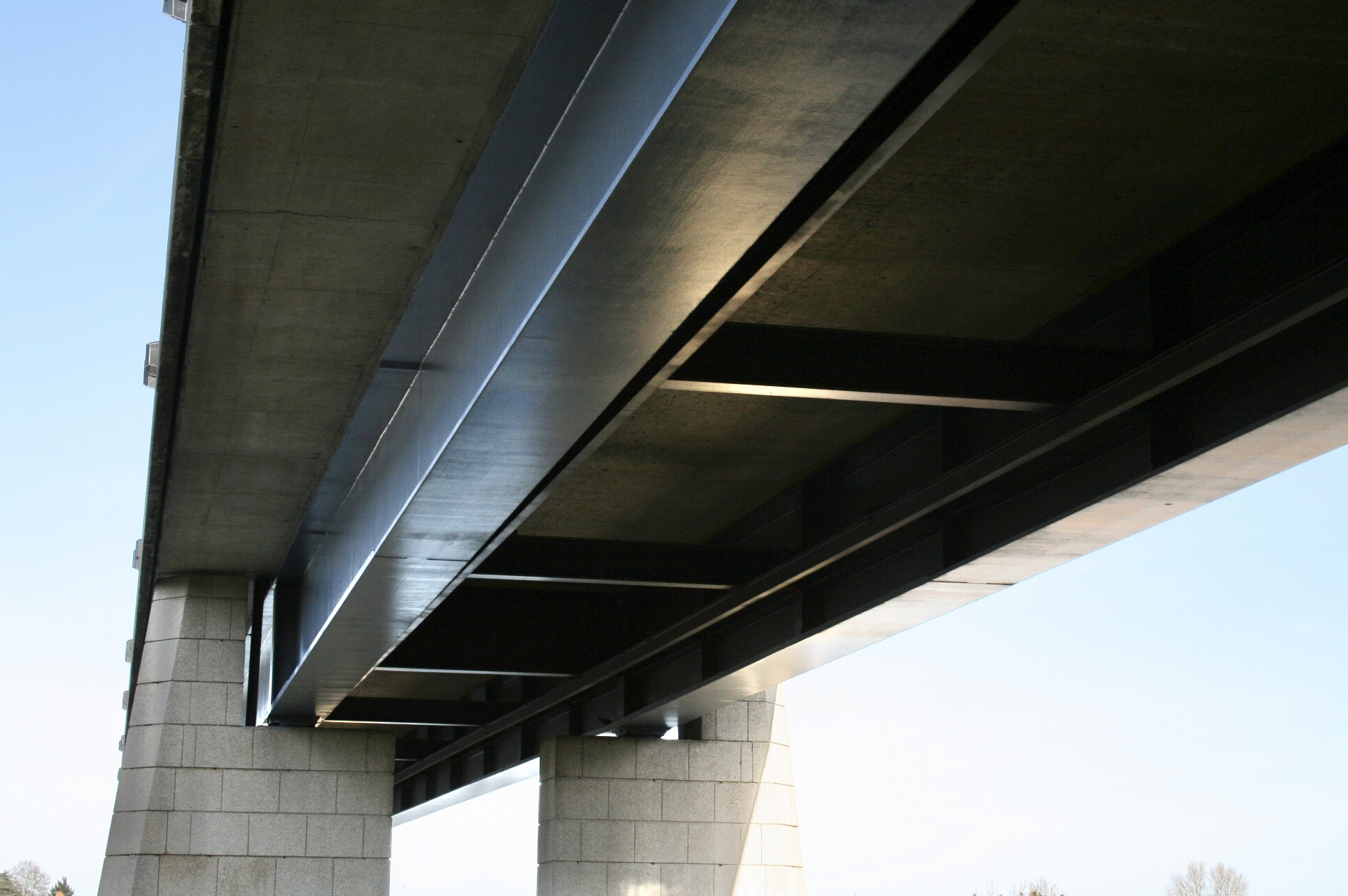 Pont de Sully-sur-Loire (Loiret - France)